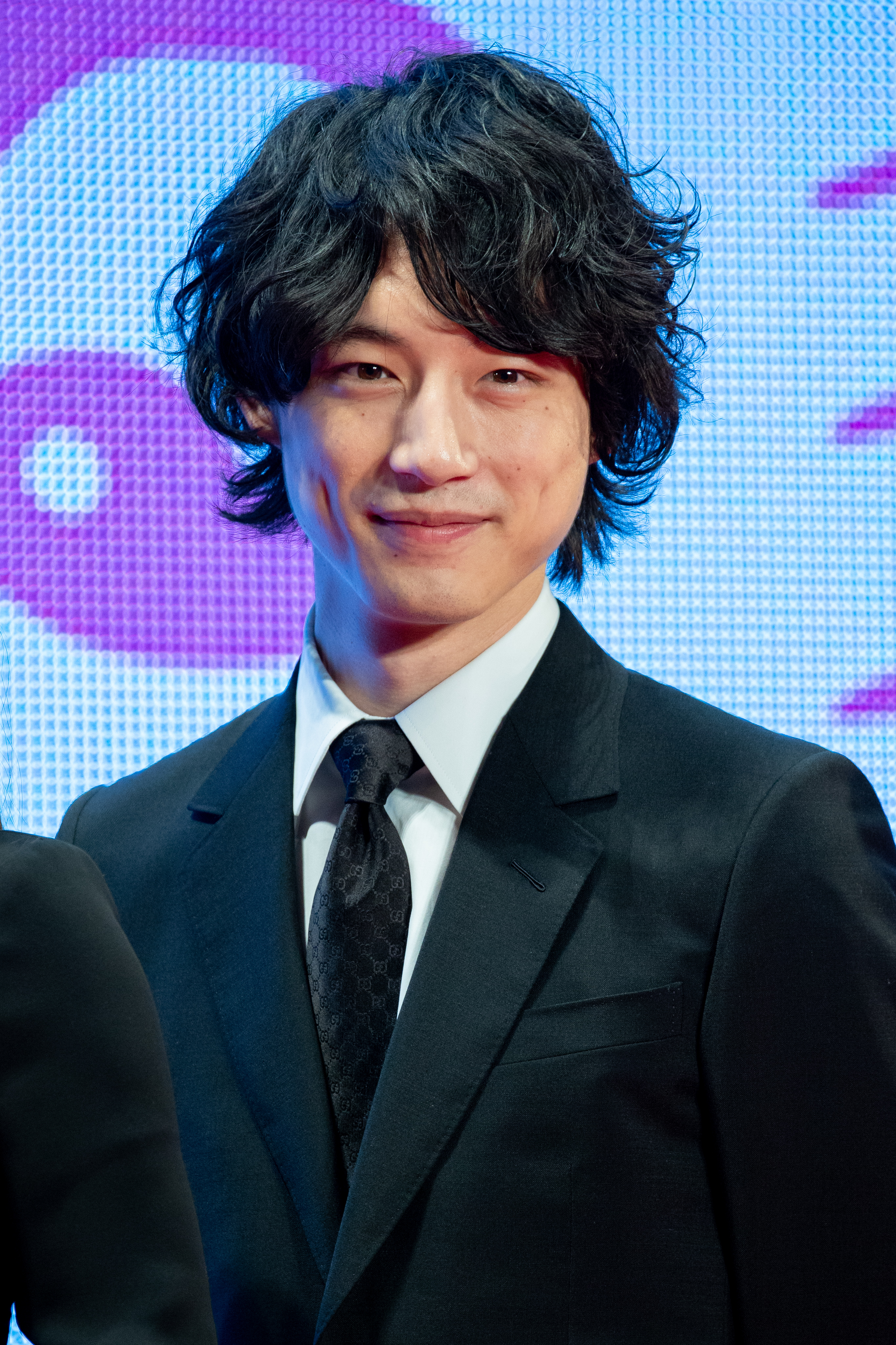 第30回 東京国際映画祭 人魚の眠る家 レッドカーペットイベント 坂口健太郎